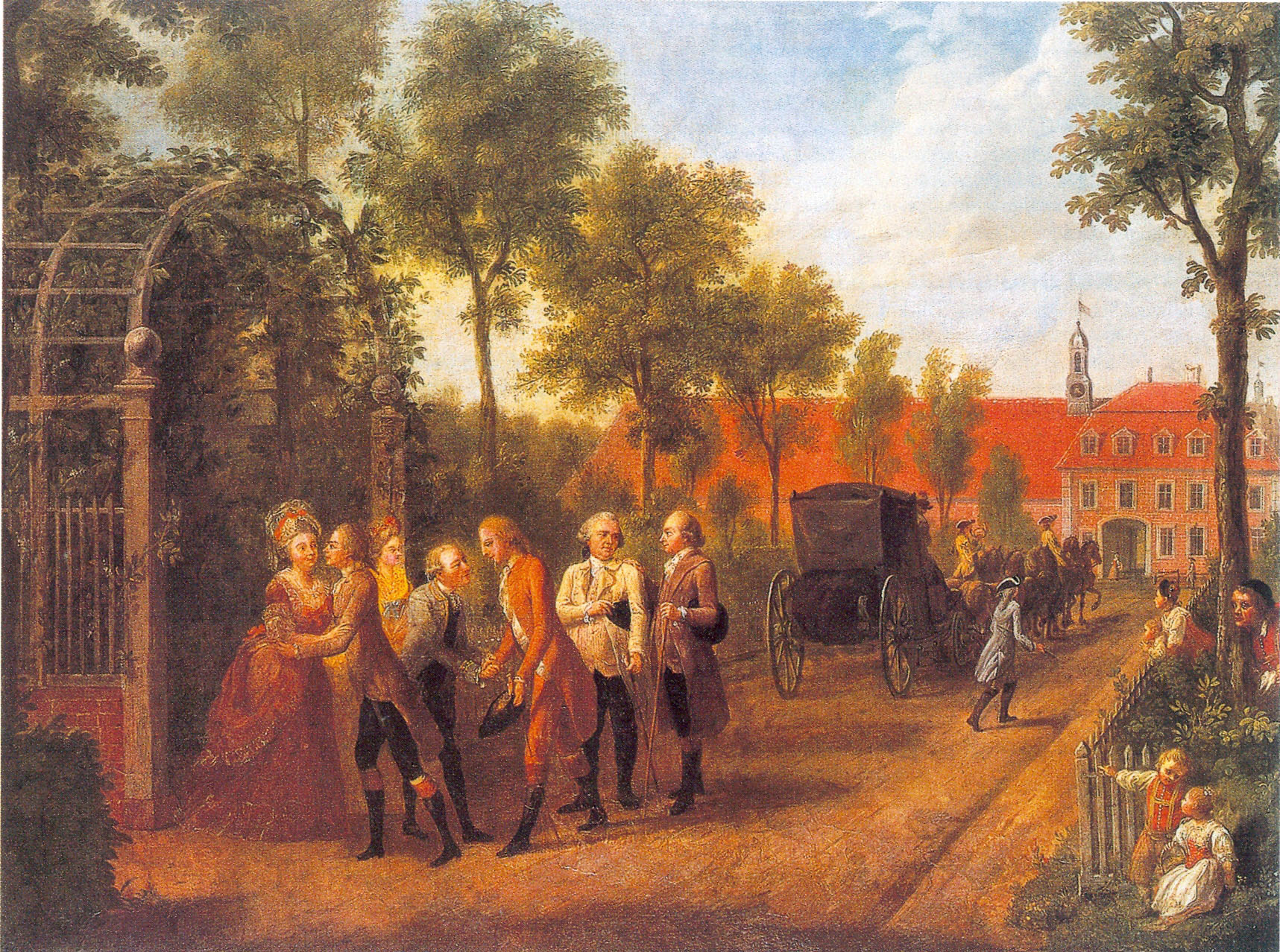 Rückkehr von der Kavalierstour der Söhne des Grafen von Stadion nach Warthausen Ölbild um 1780 Privatbesitz von links: Die Mutter Maria Ludovika, geb. Freiin Zobel zu Giebelsdtadt (1740 - 1803), der ältere Sohn Friedrich Lothar (1761 - 1811), die Tante Marie Therese Gräfin von Spaur, geb. Stadion (1729 - 1773), der Vater Franz Konrad (1736 -1787), der jüngere Sohn Johannes Philipp (1763 - 1824), der Oberamtmann Matthias Schöppl, der Hofmeister Karl Kolborn (1744 - 1816)